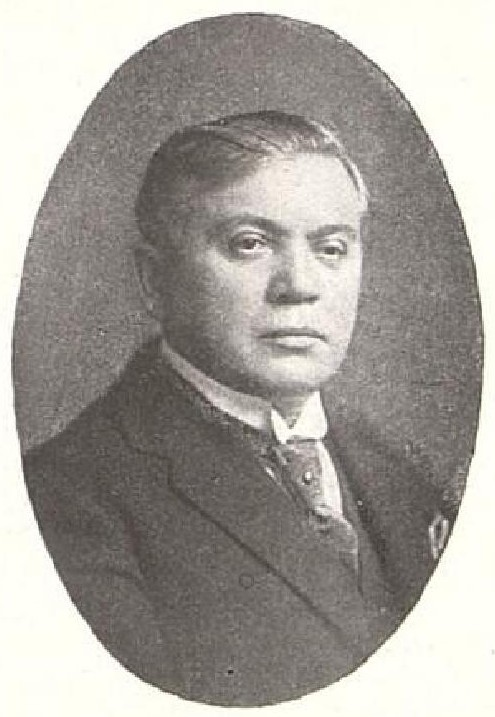 František Petrovický československý politik